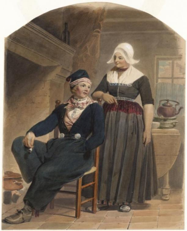 Man en vrouw in de dracht van Volendam omstreeks 1850. Aquarel gemaakt voor plaat XXXV van: Nederlandsche kleederdragten, naar de natuur geteekend = costumes des Pays-Bas, dessinés d'après nature / door Valentijn Bing en [Jan] Braet von Ueberfeldt. - Amsterdam : [s.n.], 1857.